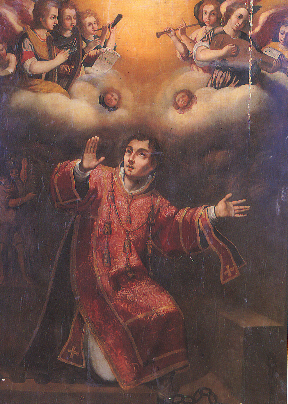 Taula de Pere Cuquet procedent del retaule major de Sant Feliu de Codines.